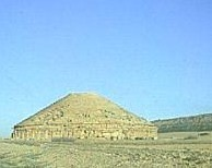 Medghassen mausoleums (Boumia, Algéria).